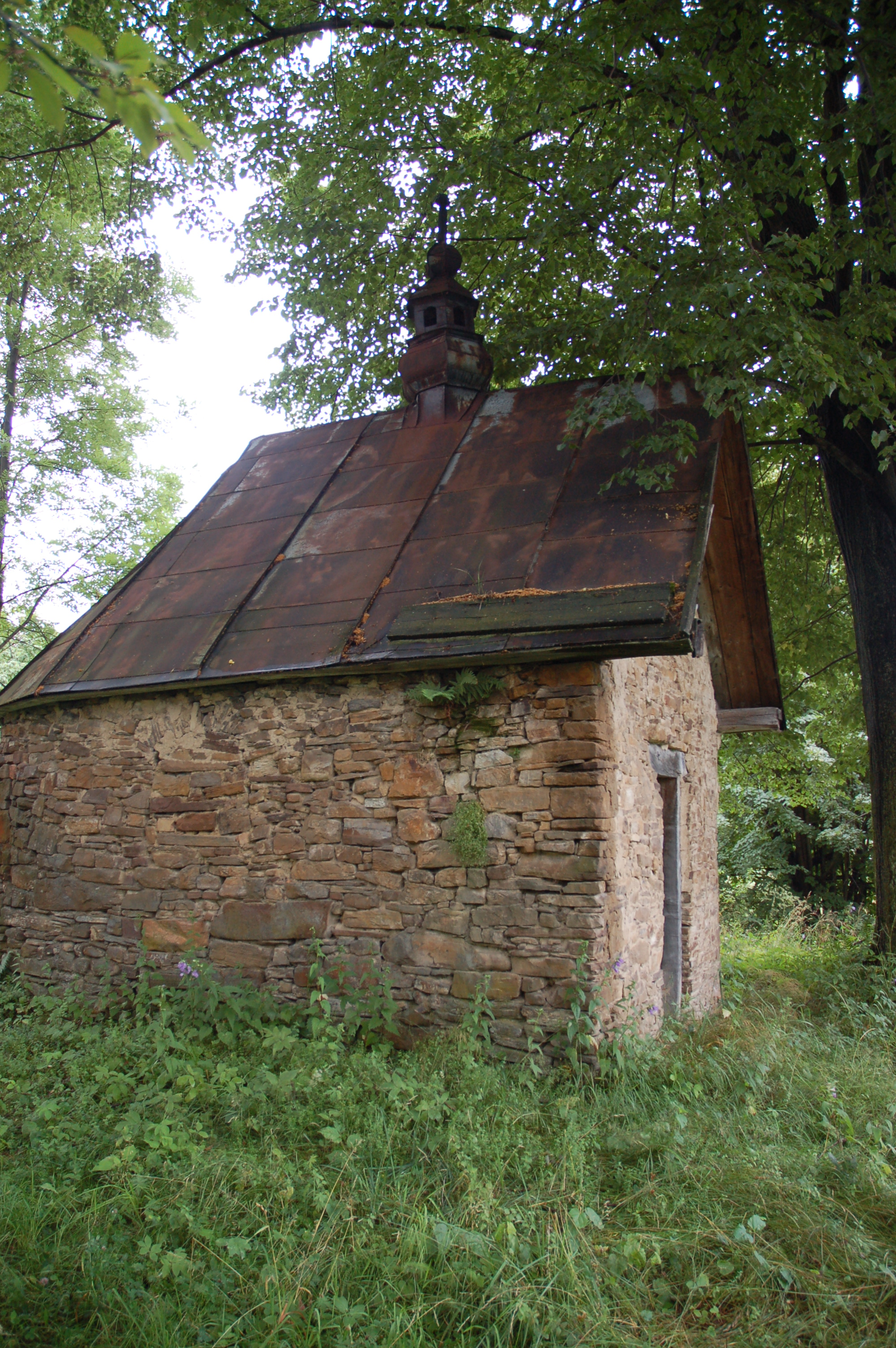 Kapliczka przydrożna w Kotowie